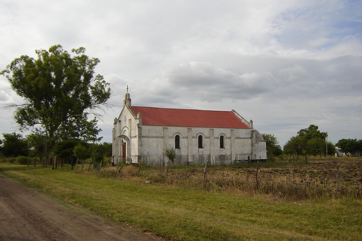 Iglesia de Pastor Britos, Entre Ríos, Argentina.